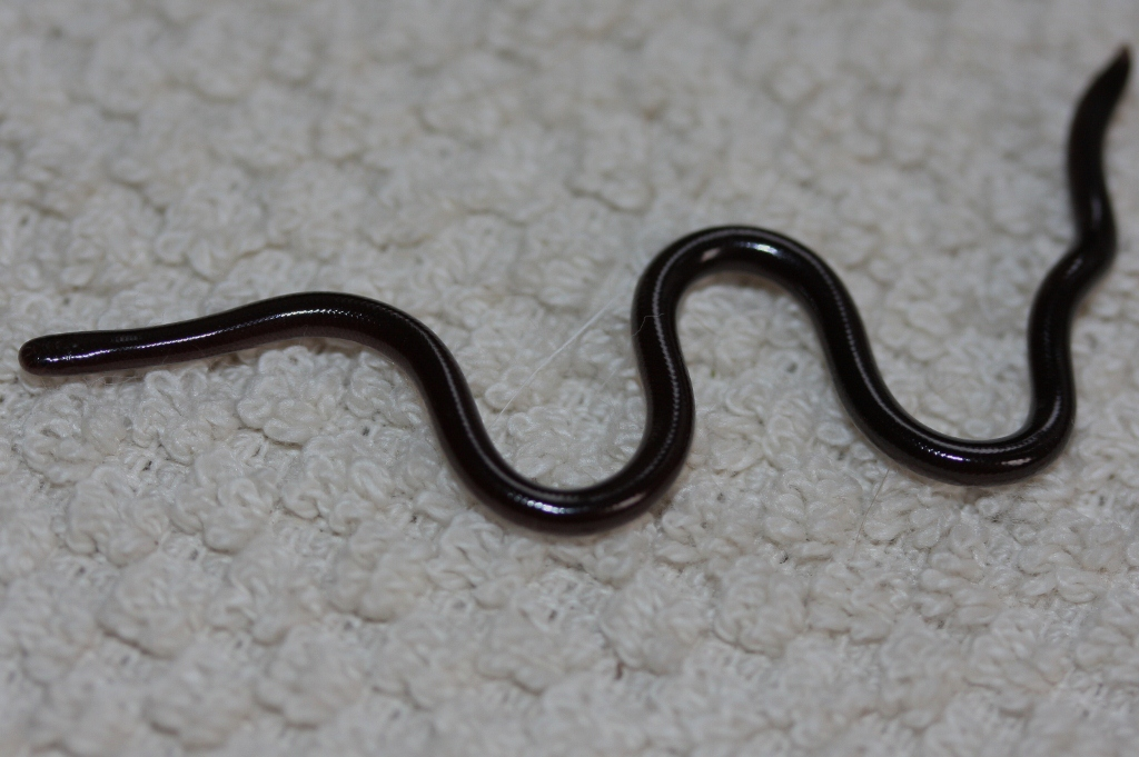 Taken near Ho Chung, Sai Kung.